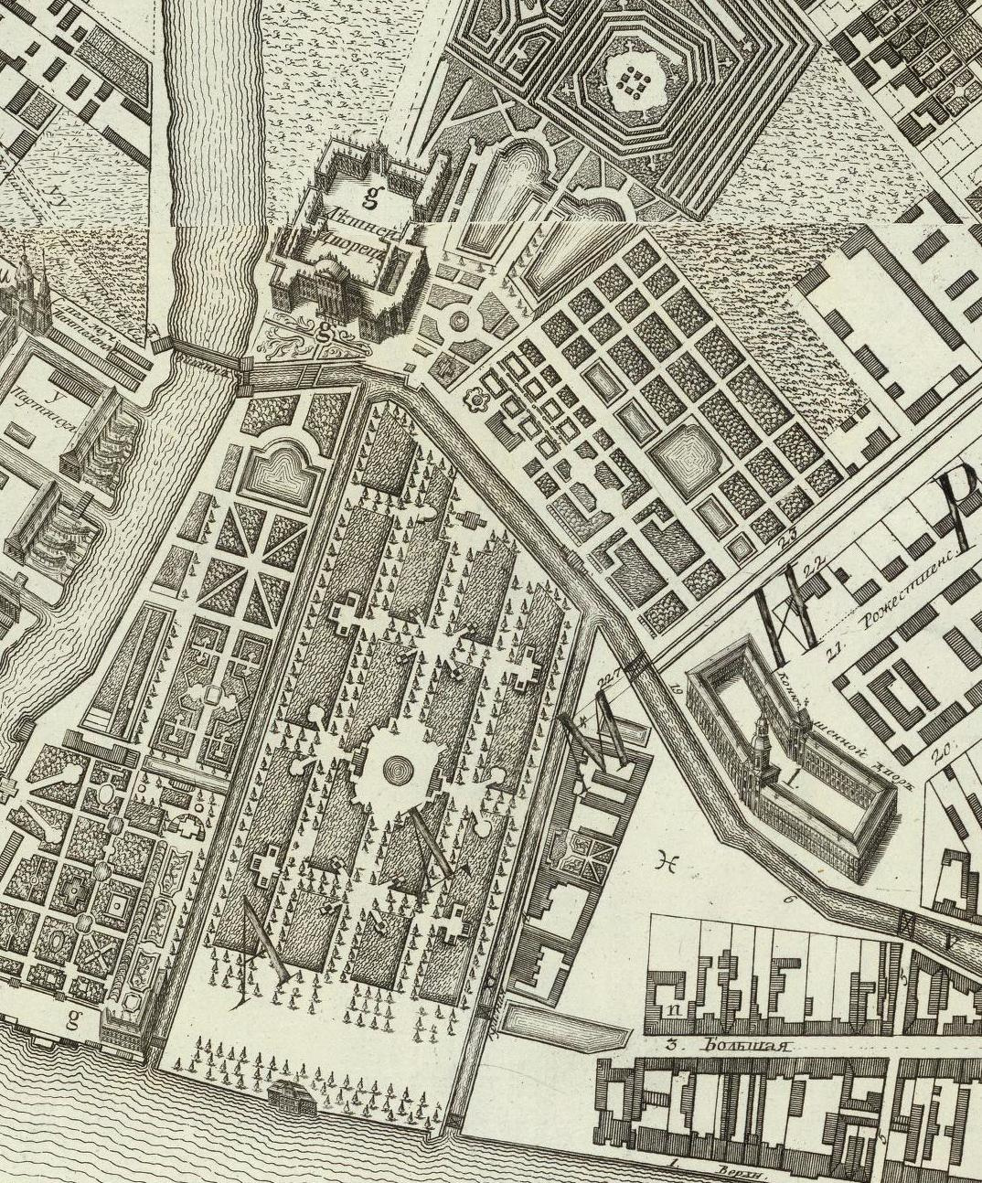 Гравюра. План столичного города Санкт-Петербурга с изображением знатнейших проспектов. 1753г. Махаев М.И.